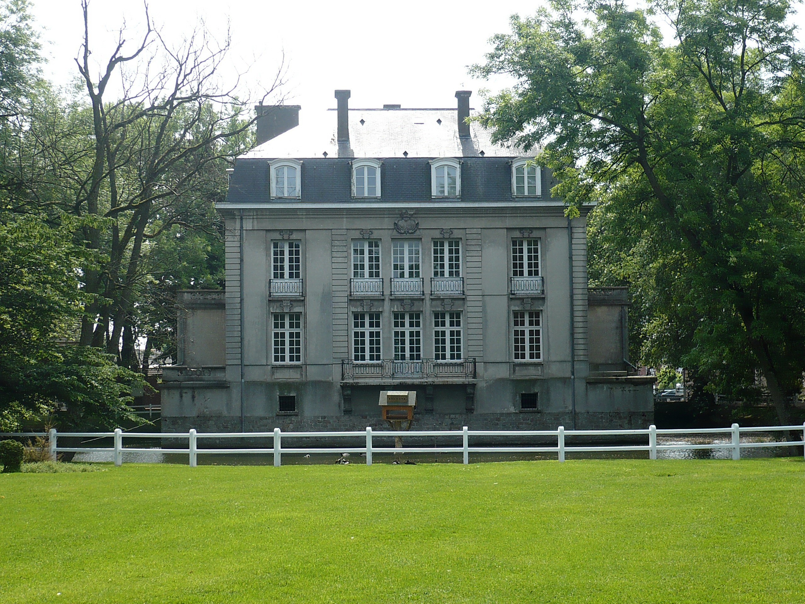 château de NIEPPE (59850) France, reconstruction après la 1ère Guerre Mondiale, médiathèque de la Ville et lieu d'expositions , Parc Public